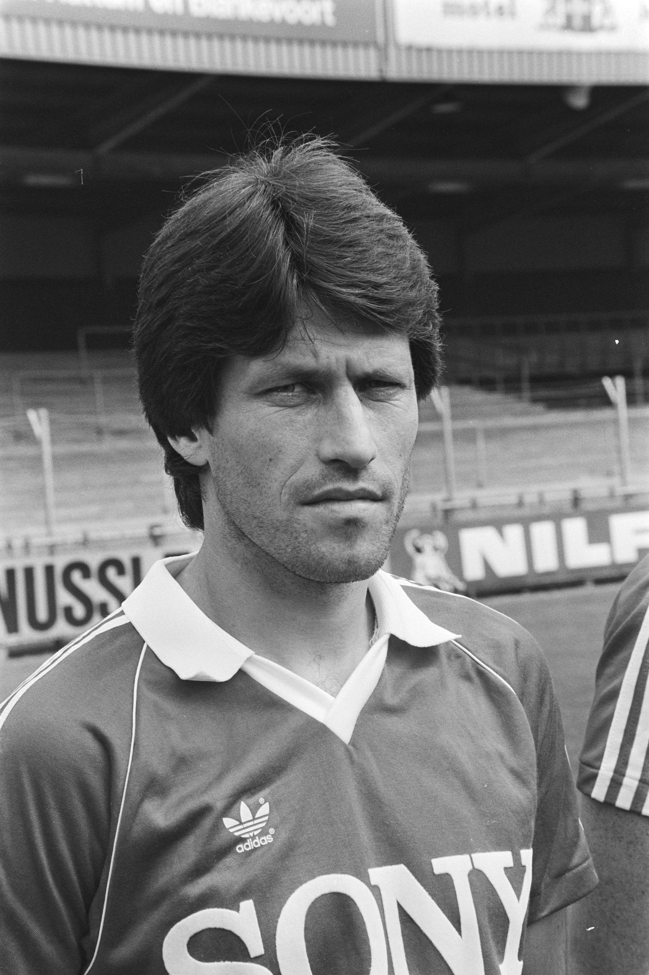 Collectie / Archief : Fotocollectie Anefo Reportage / Serie : [ onbekend ] Beschrijving : Persdag AZ 67 ; Peter Arntz , kop Datum : 4 augustus 1982 Trefwoorden : sport, voetbal Instellingsnaam : AZ'67 Fotograaf : Dijk, Hans van / Anefo Auteursrechthebbende : Nationaal Archief Materiaalsoort : Negatief (zwart/wit) Nummer archiefinventaris : bekijk toegang 2.24.01.05 Bestanddeelnummer : 932-2666